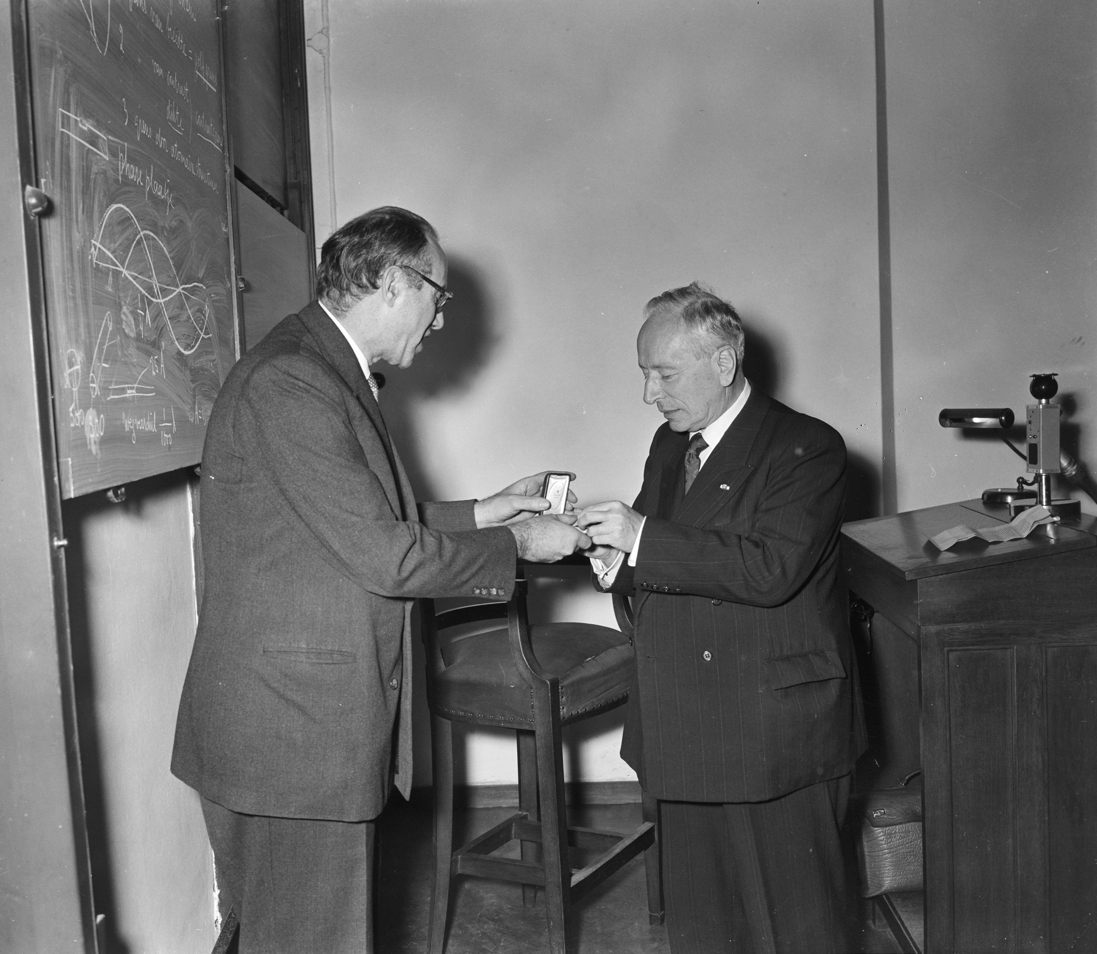 Snellius-medaille voor Prof. Zernike (r) links Prof. J.A.A. Ketelaar. Datum 30 november 1955